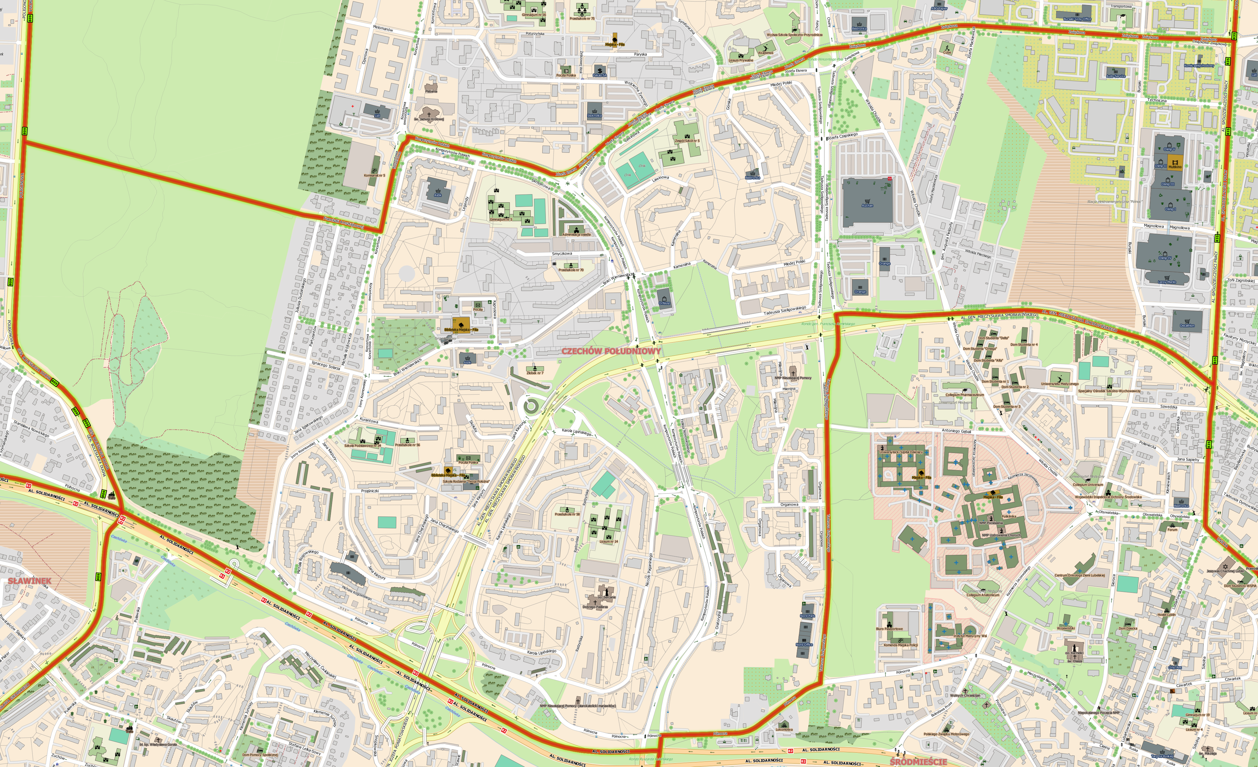 Plan dzielnicy Czechów Południowy w Lublinie.